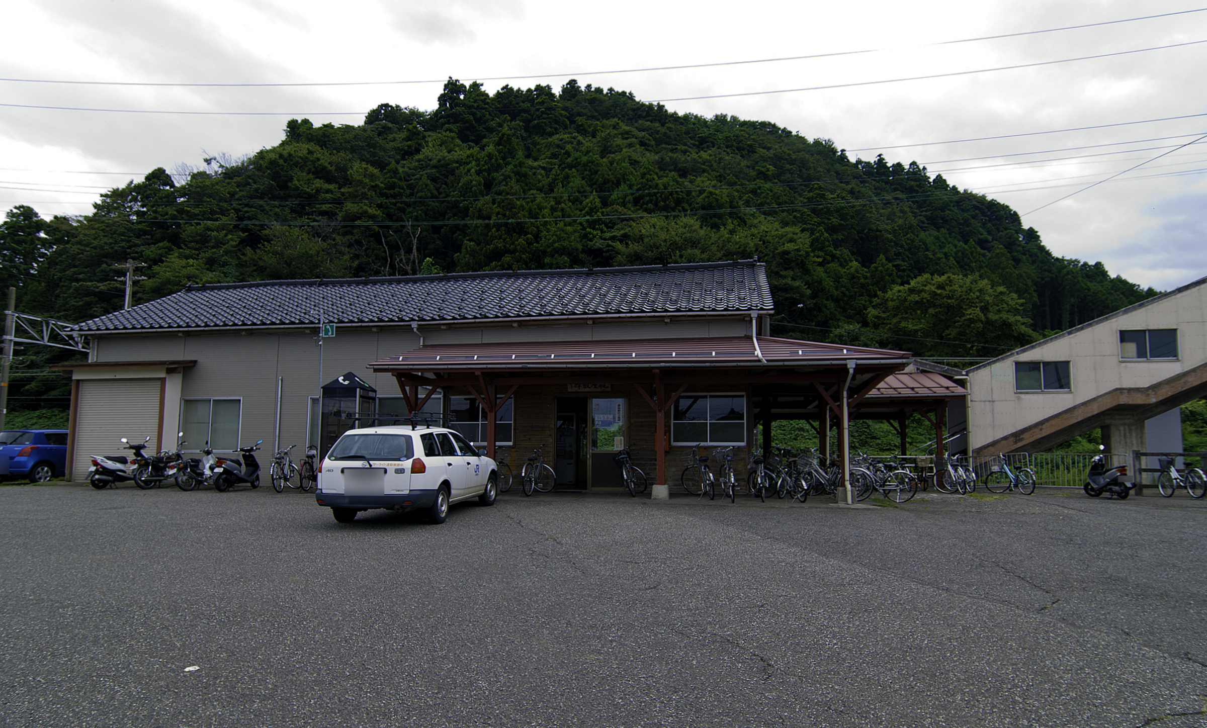 西日本旅客鉄道株式会社北陸本線梶屋敷駅駅舎